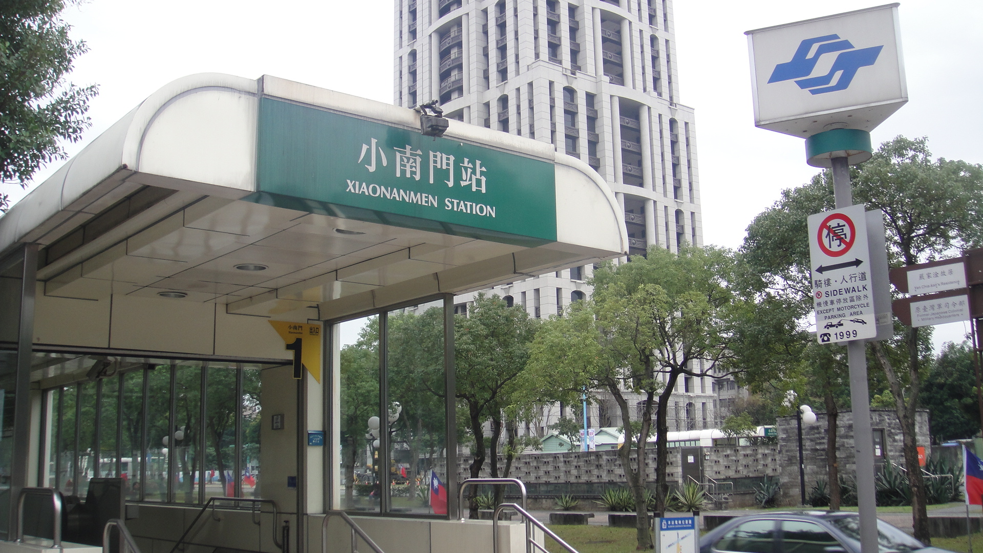 台北捷運小南門站一號出口，後方為知名豪宅元大一品苑